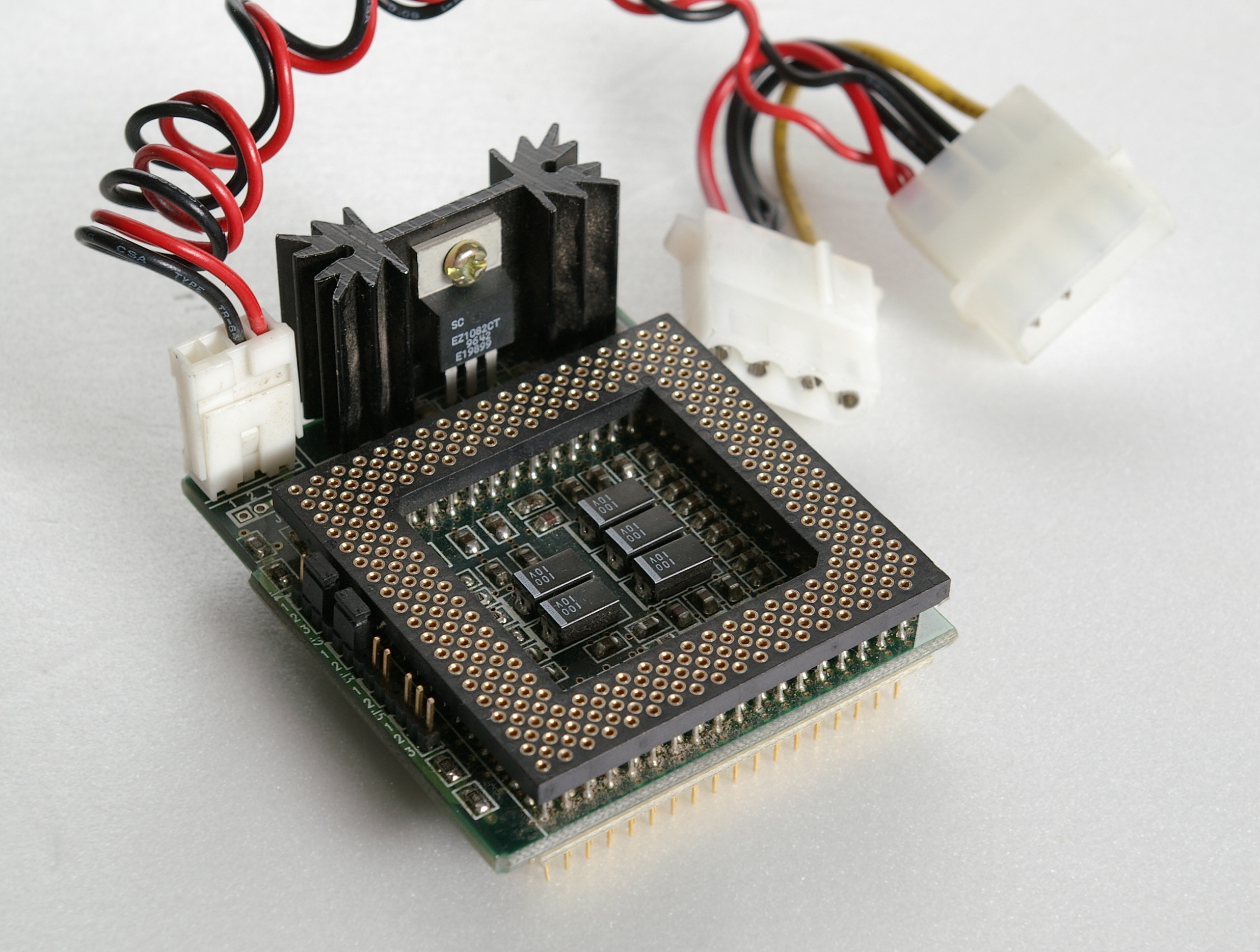 Bildbeschreibung: Zwischensockel mit Spannungswandler zur Verwendung mit Pentium-Prozessoren mit Split-Voltage-Versorgung (P55C) auf Hauptplatinen, die nur Modelle mit einfacher Betriebsspannung (P54C) unterstützen.